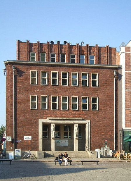 Stralsund, Alter Markt 4, Gewerkschaftshaus